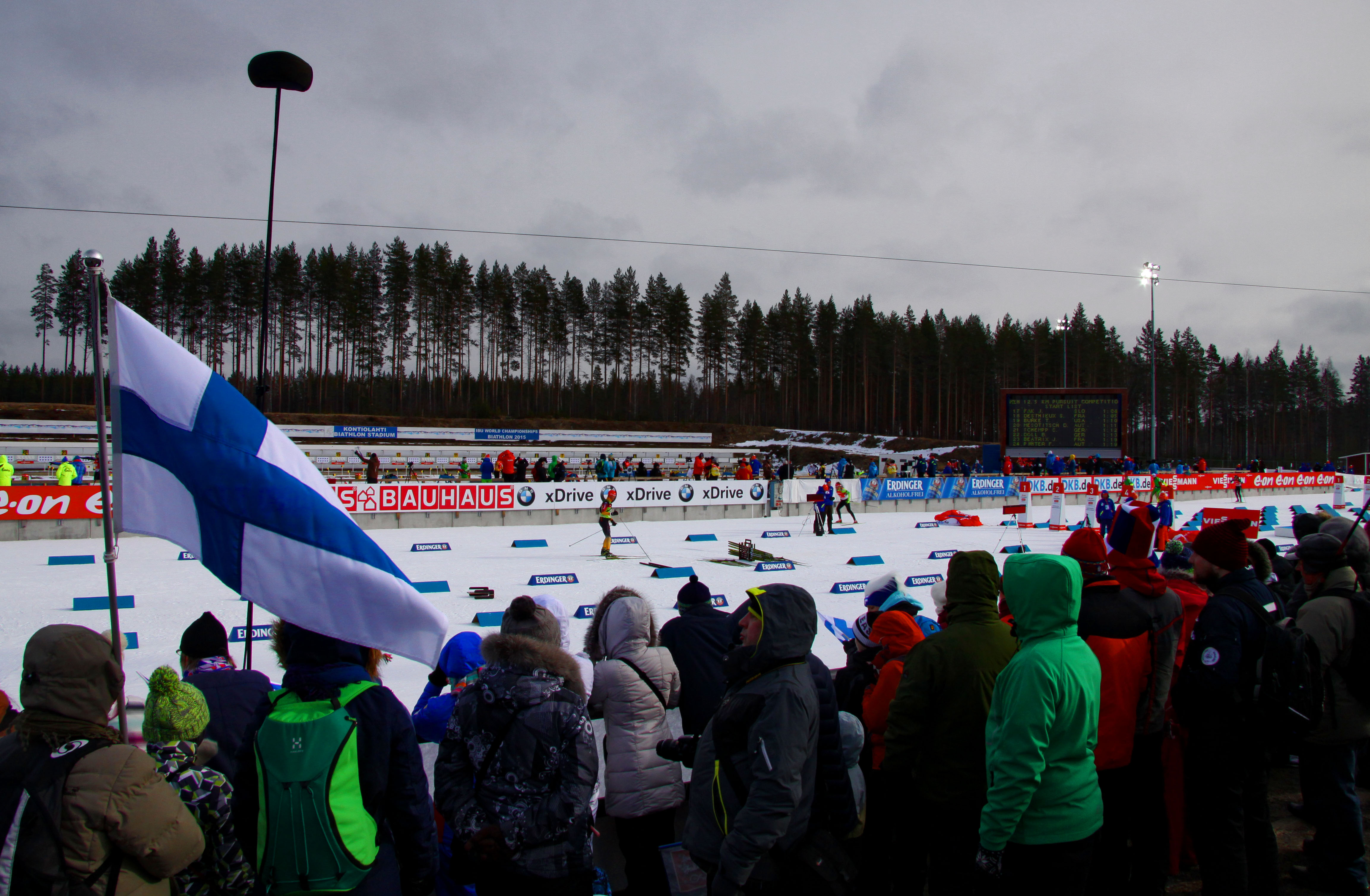 Kontiolahti. A la Coupe du Monde de Biathlon. Huitième étape de la Coupe du monde de biathlon 2013-2014 à Kontiolahti en Finlande.